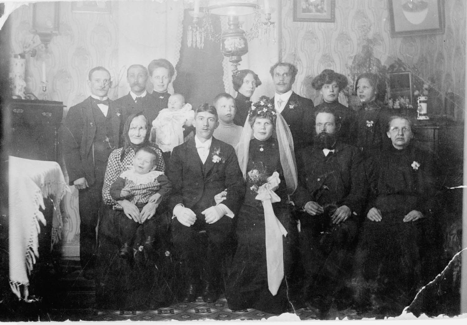 Vigselbild, Silverdalen. Släktbild med brudpar i mitten.